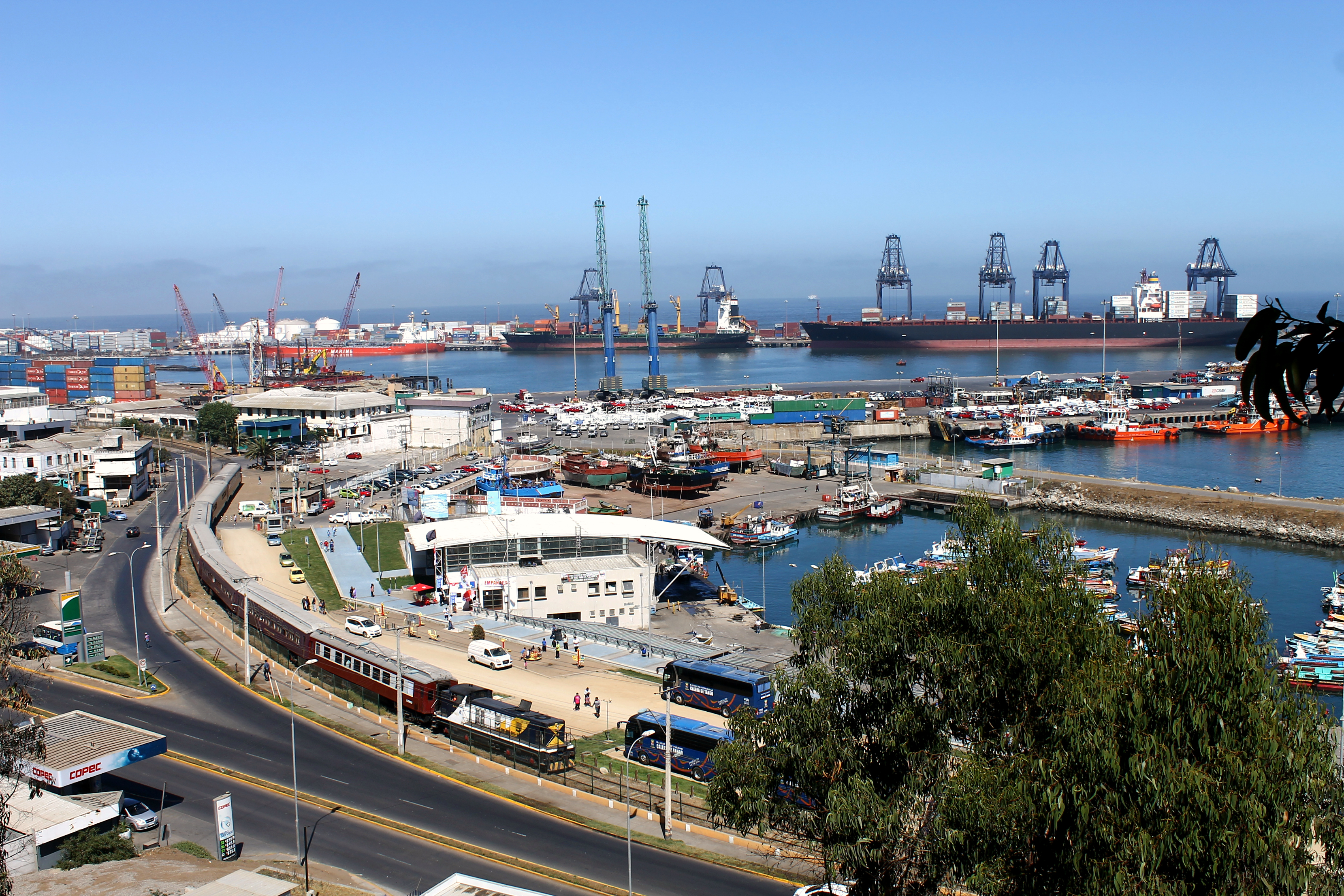 El expreso del recuerdo, abriendose paso por la costanera de la ciudad puerto.